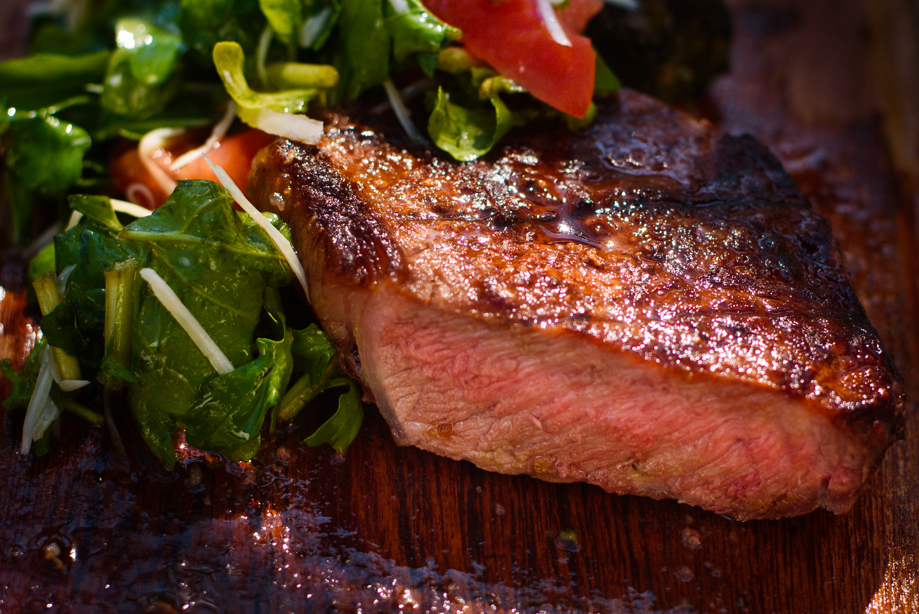 Bife de chorizo a la parrilla exhibiendo el punto justo donde la carne está cocida pero no seca